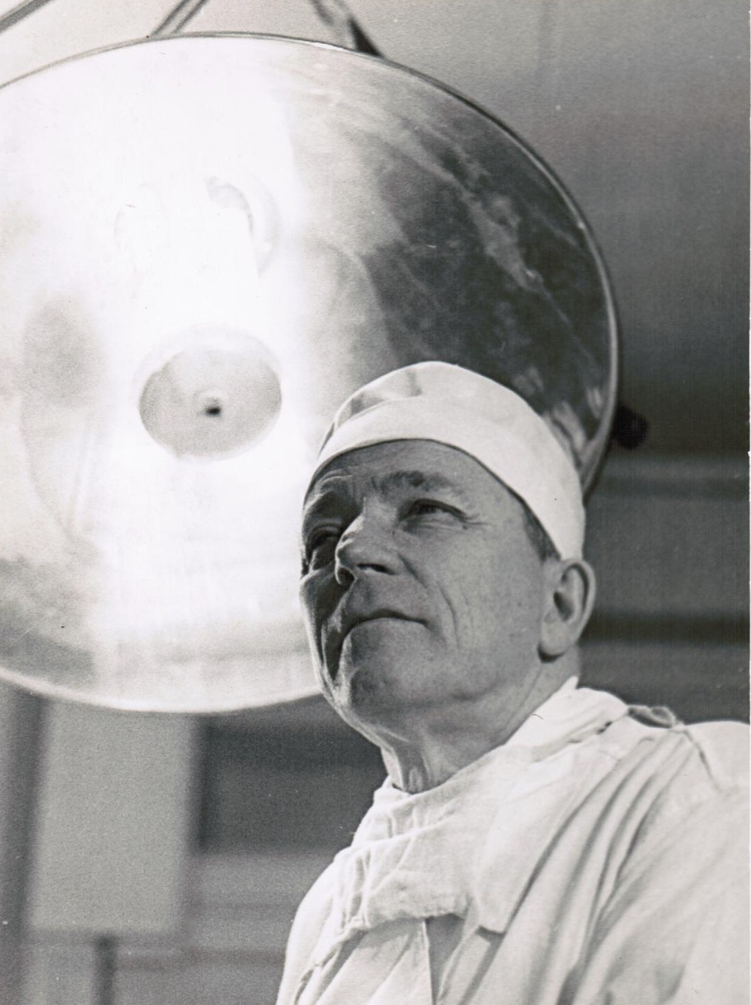 Фото знаменитого хирурга Героя Социалистического Труда Дмитрия Павловича Голубева